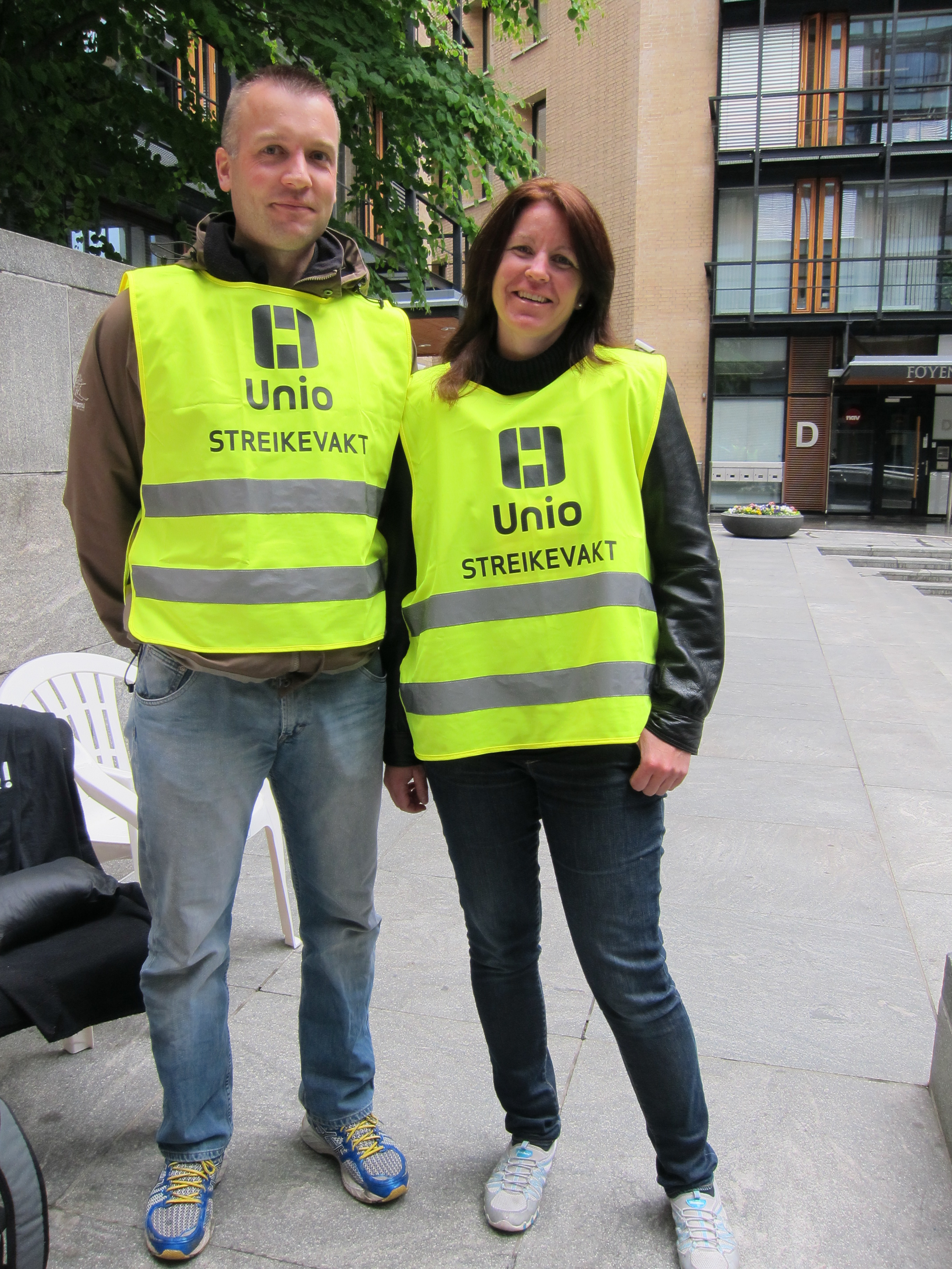 Norwegian labor members